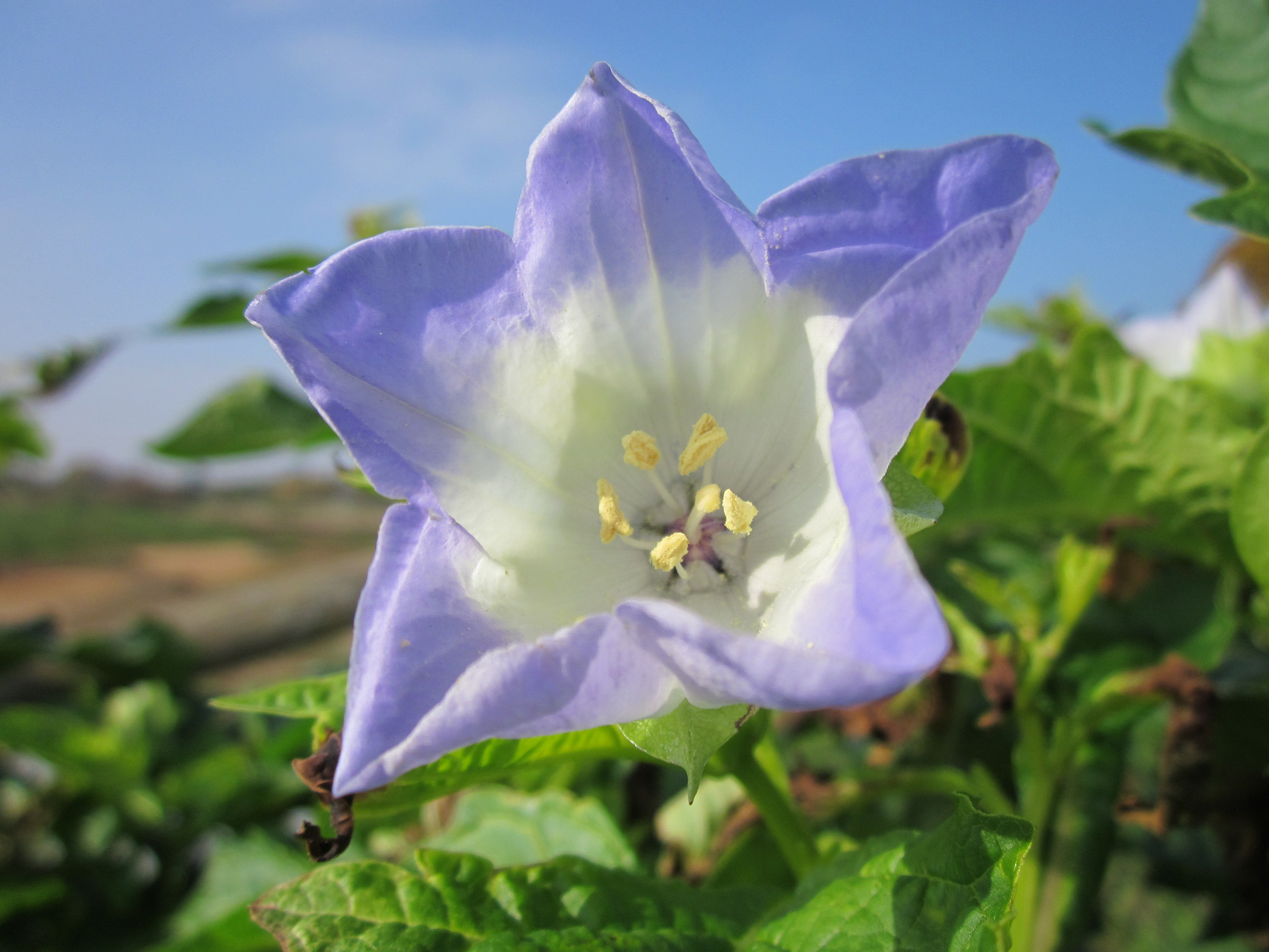 Giftbeere (Nicandra physalodes) bei Neulußheim (Gemarkung Altlußheim)